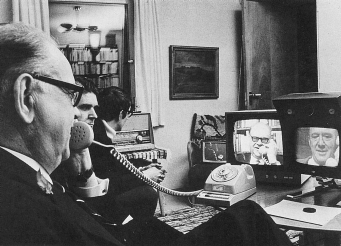 Tage Erlander provar bildtelefonen och talar med Lennart Hyland English translation via Google Translate:(Swedish Prime Minister) Tage Erlander tries a videophone and speaks with Lennart Hyland. Caption at Ericsson's videophone history webpage reads: "Tage Erlander, Swedish PM, uses the videophone to talk to Lennart Hyland, a popular TV show host, 1969."